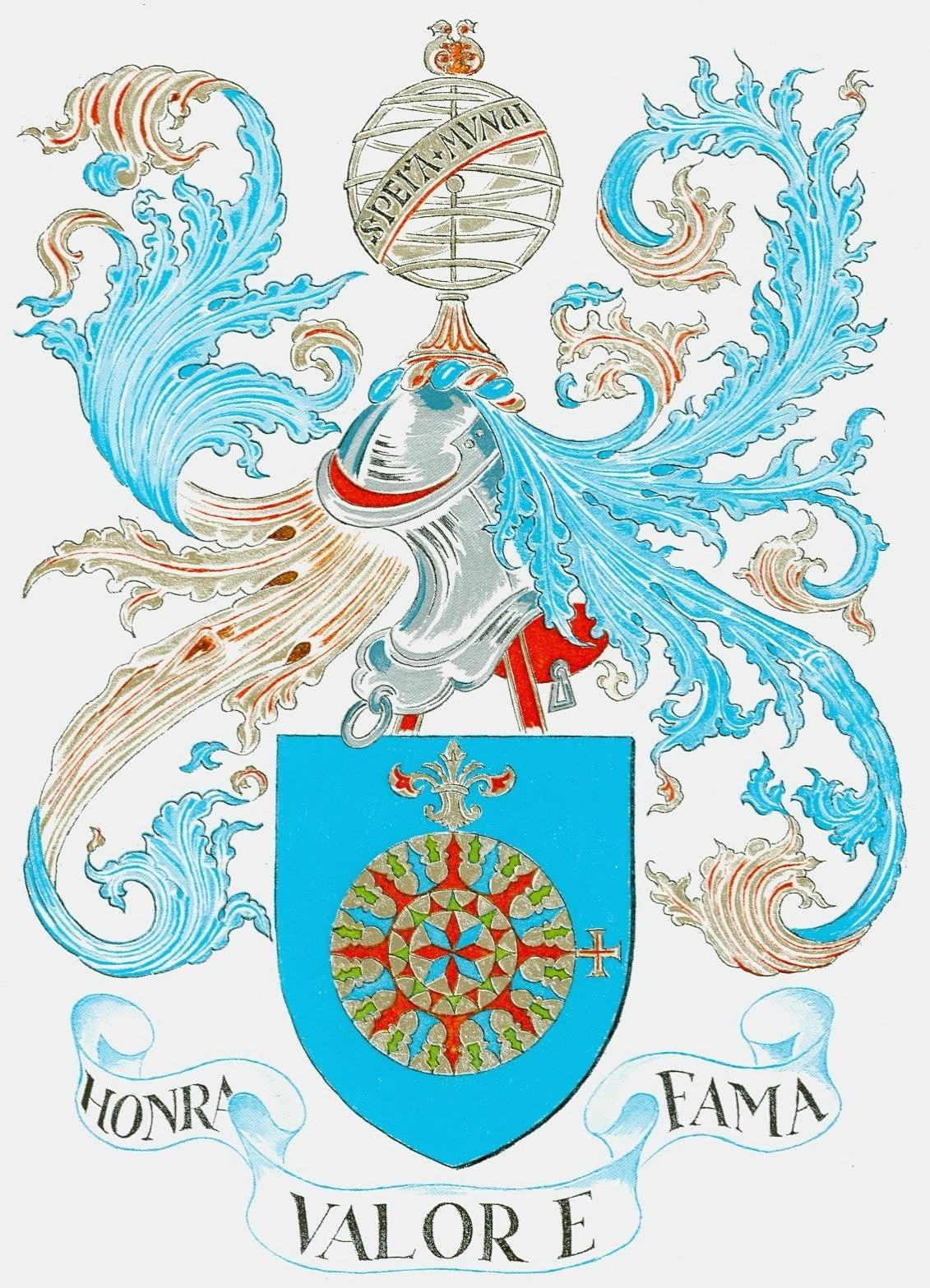 Brazão de Armas de um Regimento Militar Português